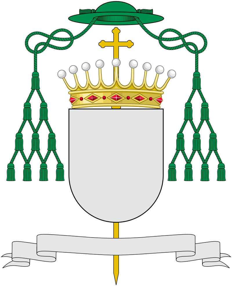 Brasão de armas do Bispo-Conde de Coimbra (Bispo de Coimbra e Conde de Arganil)